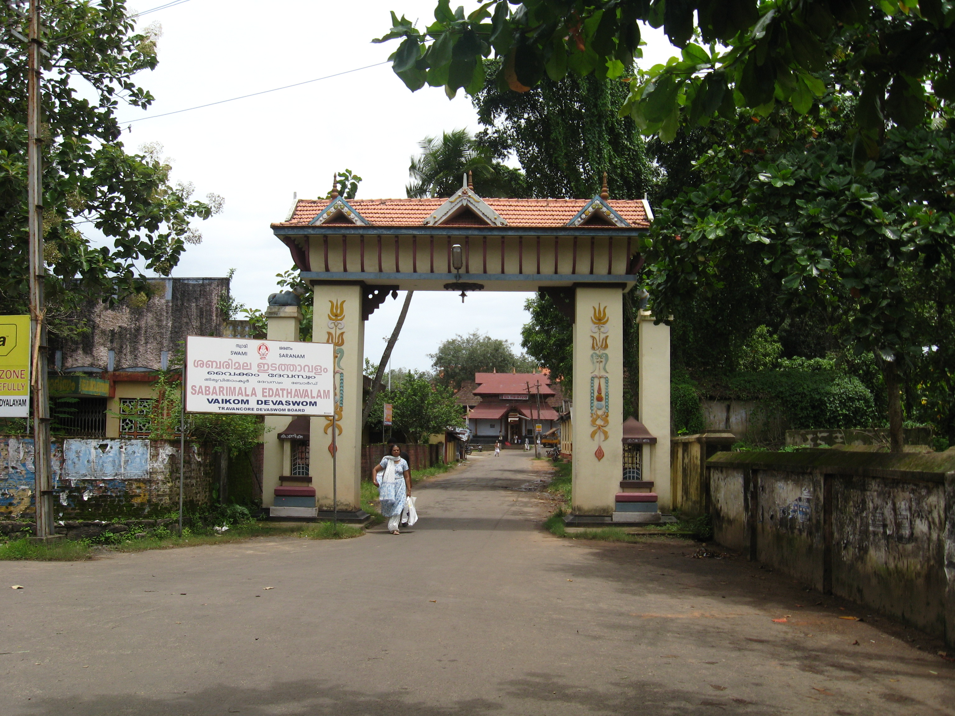 വൈക്കം മഹാദേവക്ഷേത്രത്തിന്റെ കിഴക്കേ ഗോപുരം